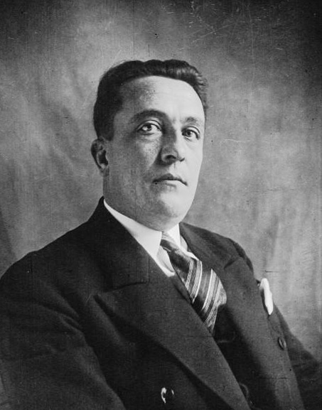 M. Jean-Pierre Mourer, député du Bas-Rhin : photographie de presse